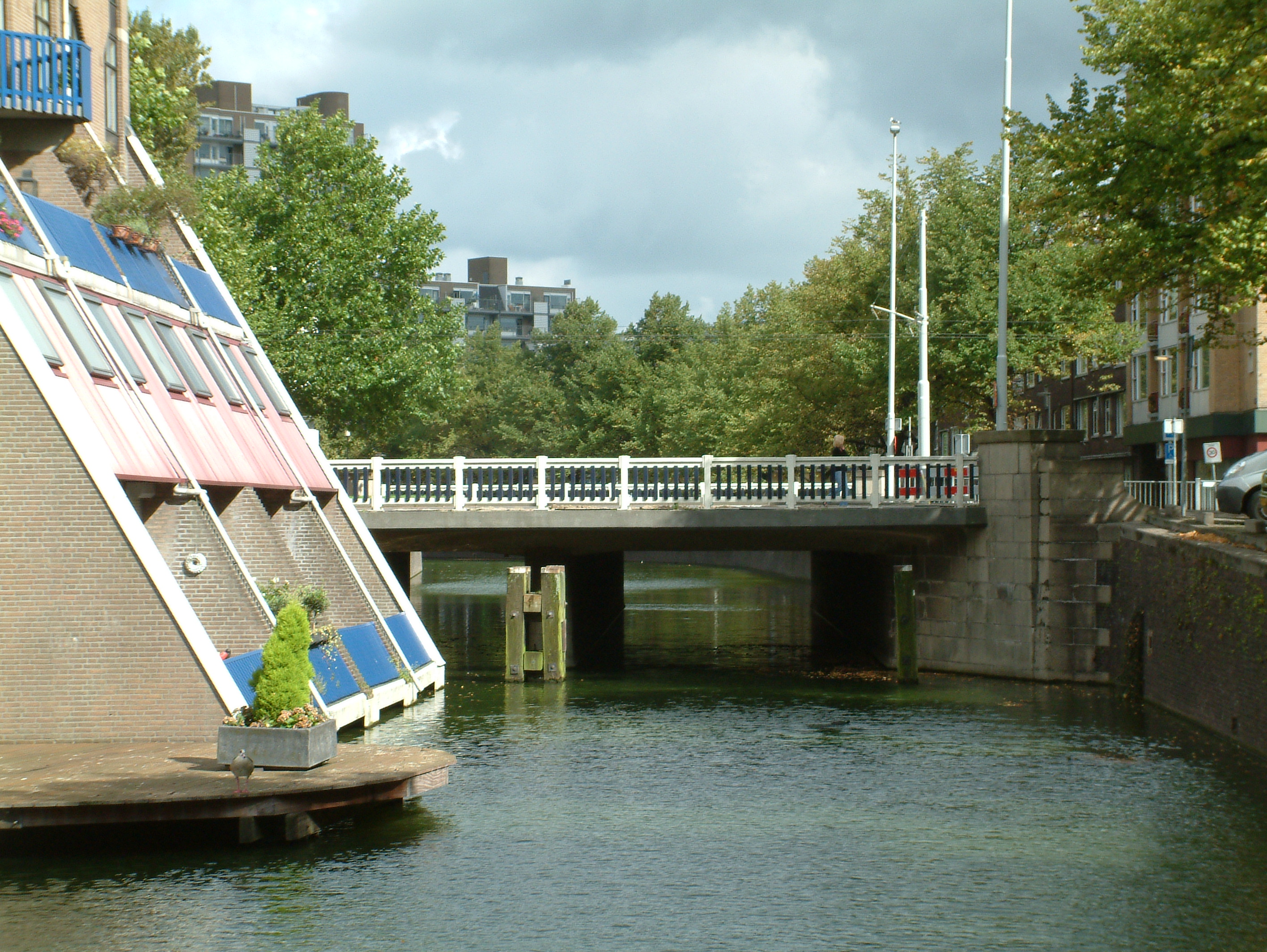 Bruggen over de Rotte, De Karnemelksbrug in de Goudsesingel, westkant